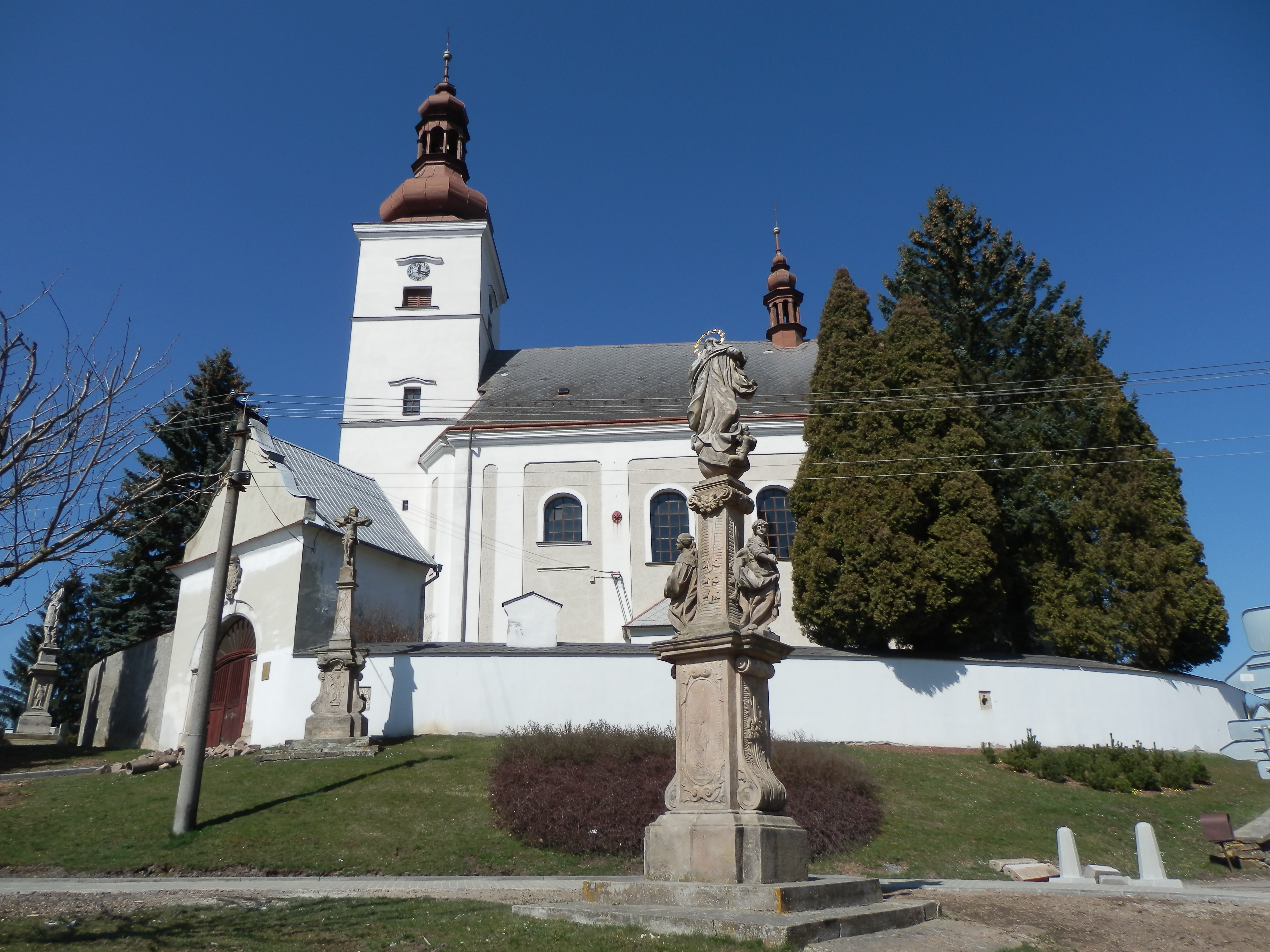 Kostel svatého Mikuláše, Rychnov na Moravě.